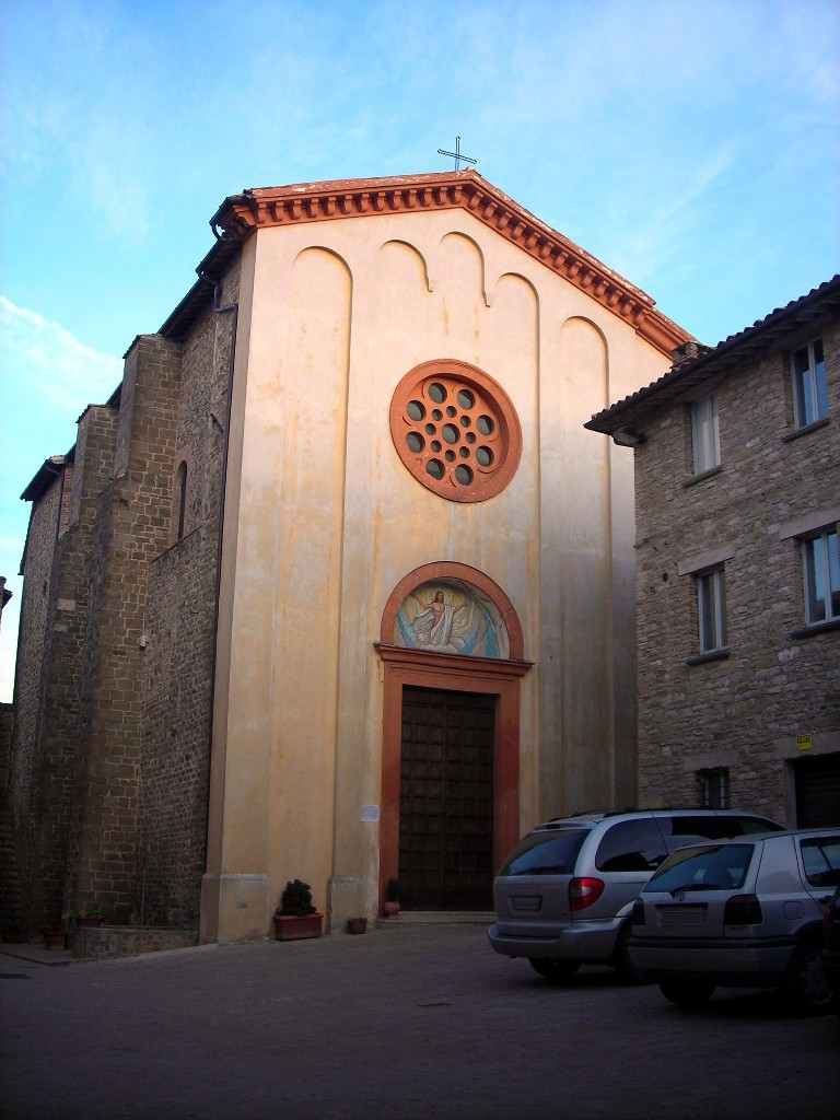 Church of St Maria assunta, Casacastalda, Valfabbrica, Perugia, Umbria, Italy